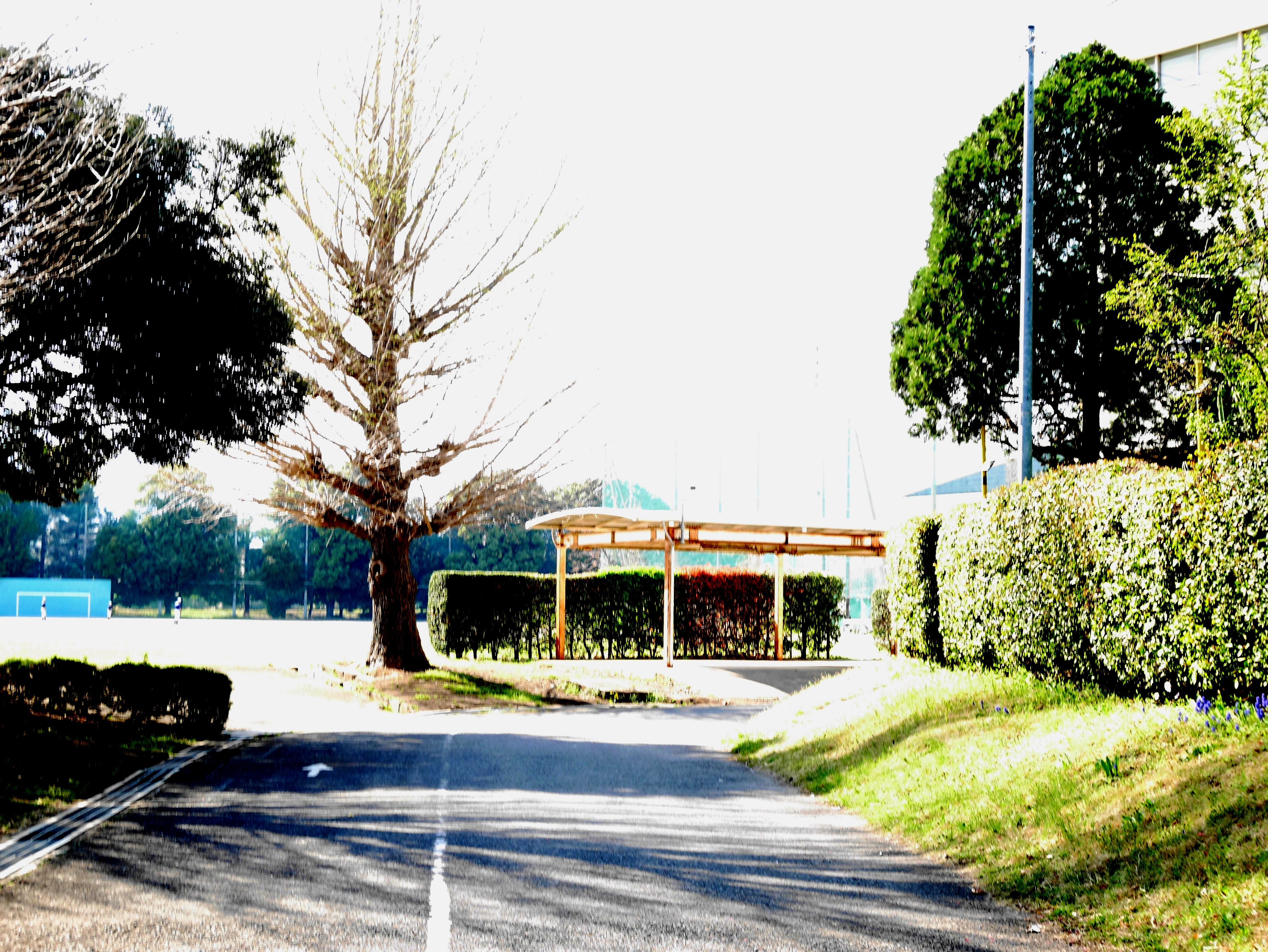 神奈川県立厚木高等学校グラウンド